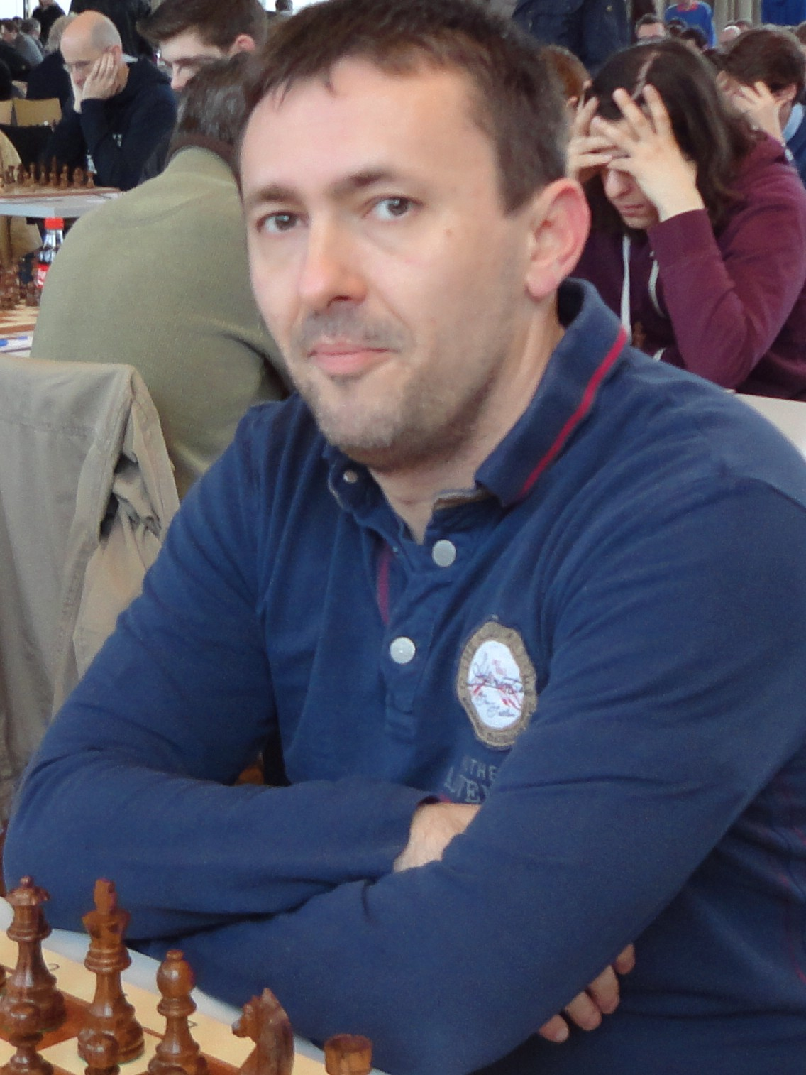 Ivan Ivanisevic, Grenke Chess Open 2016 in Karlsruhe.